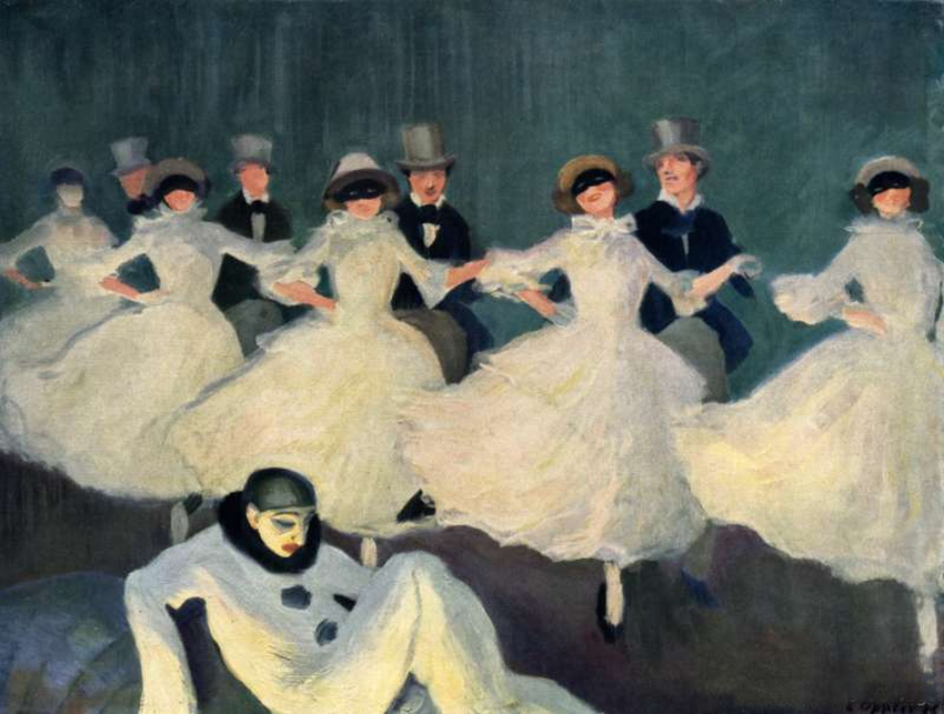 Ernst Oppler: "Karneval-Walzer"